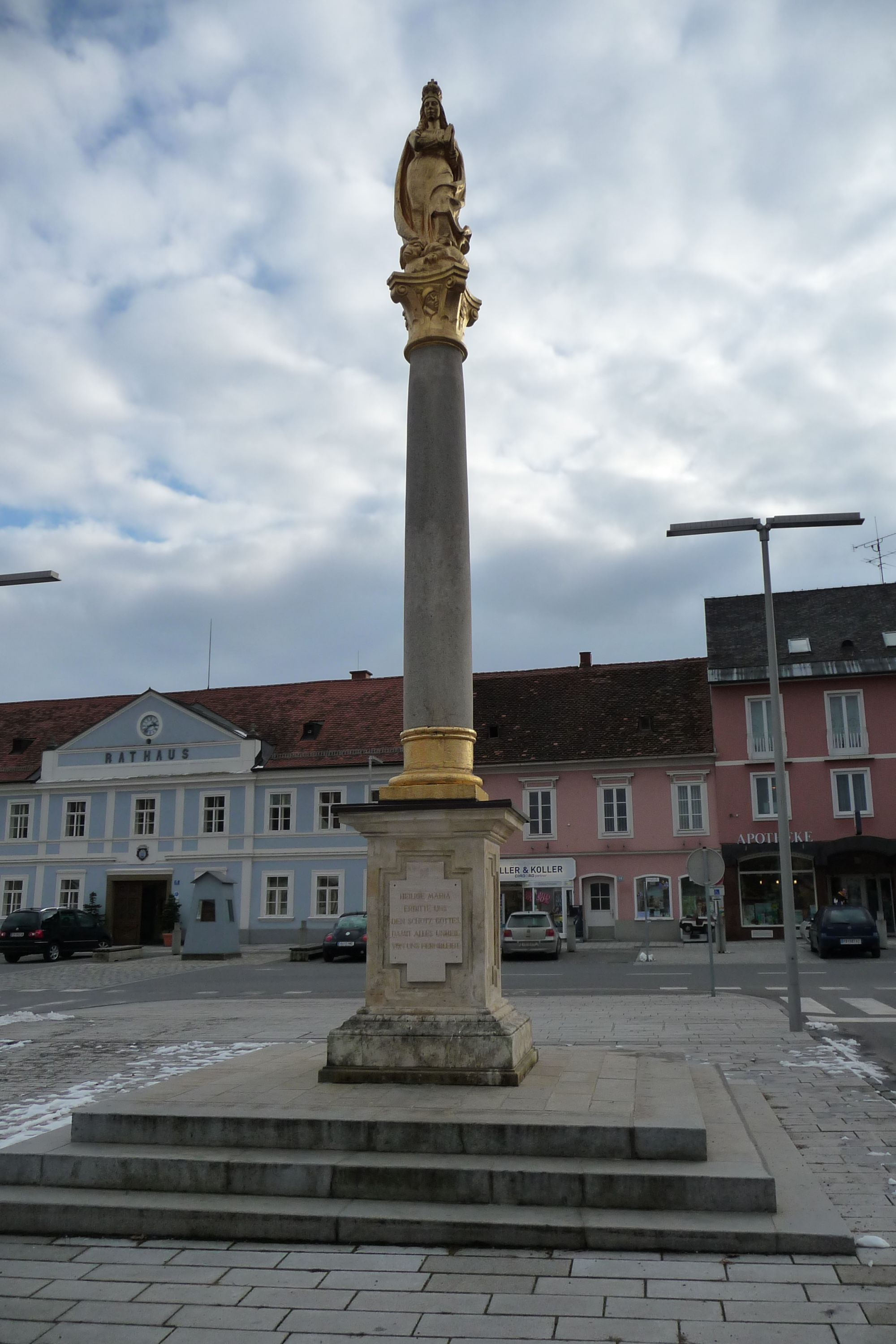 Mariensäule am Hauptplatz in Feldbach, Steiermark